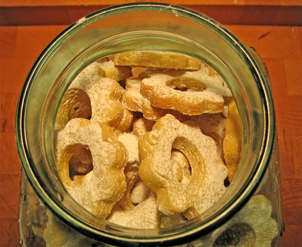 appena sfornati